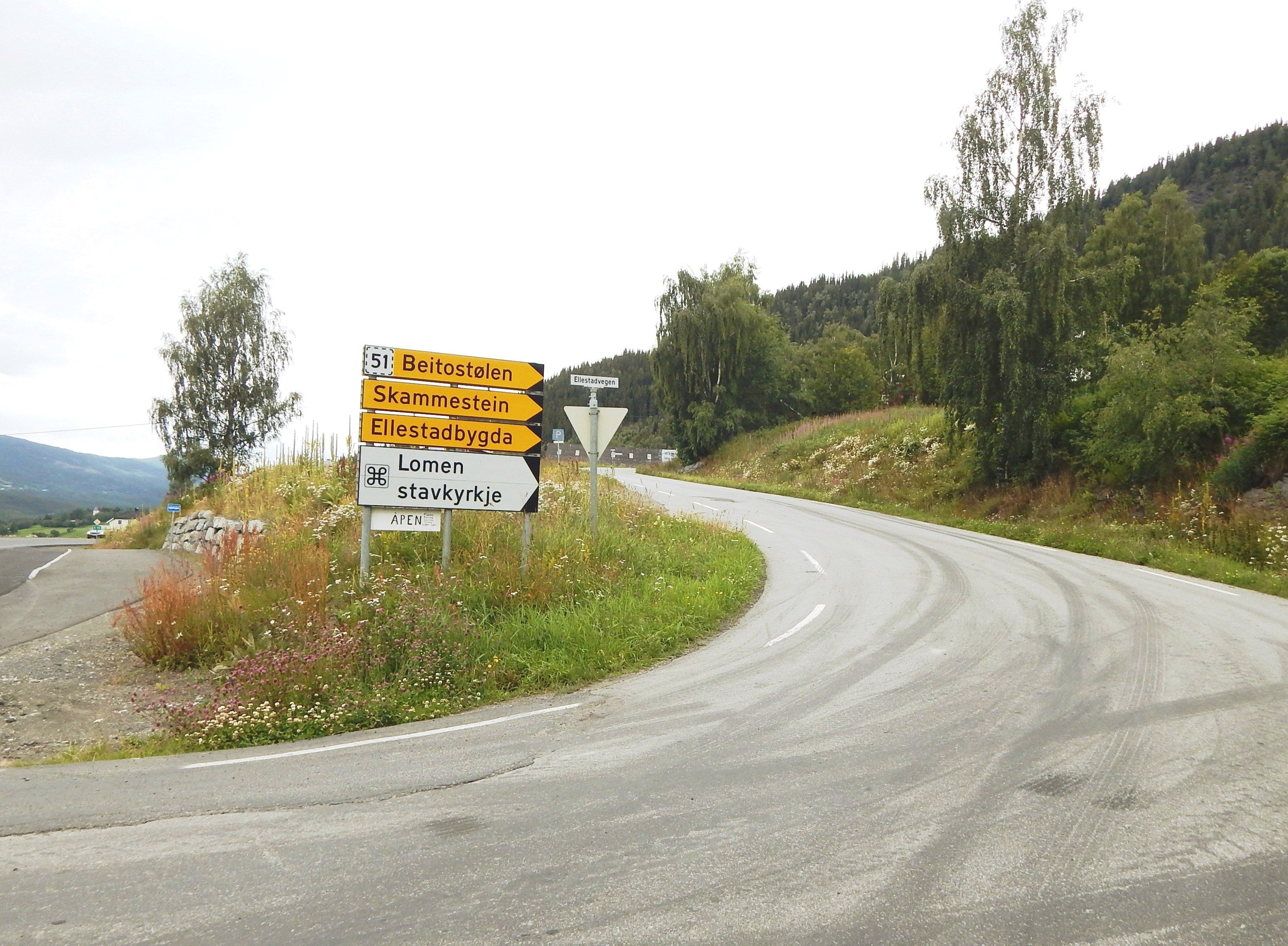 Ellestadvegen (fylkesvei 2510, tidl. 293) tar av fra E16.